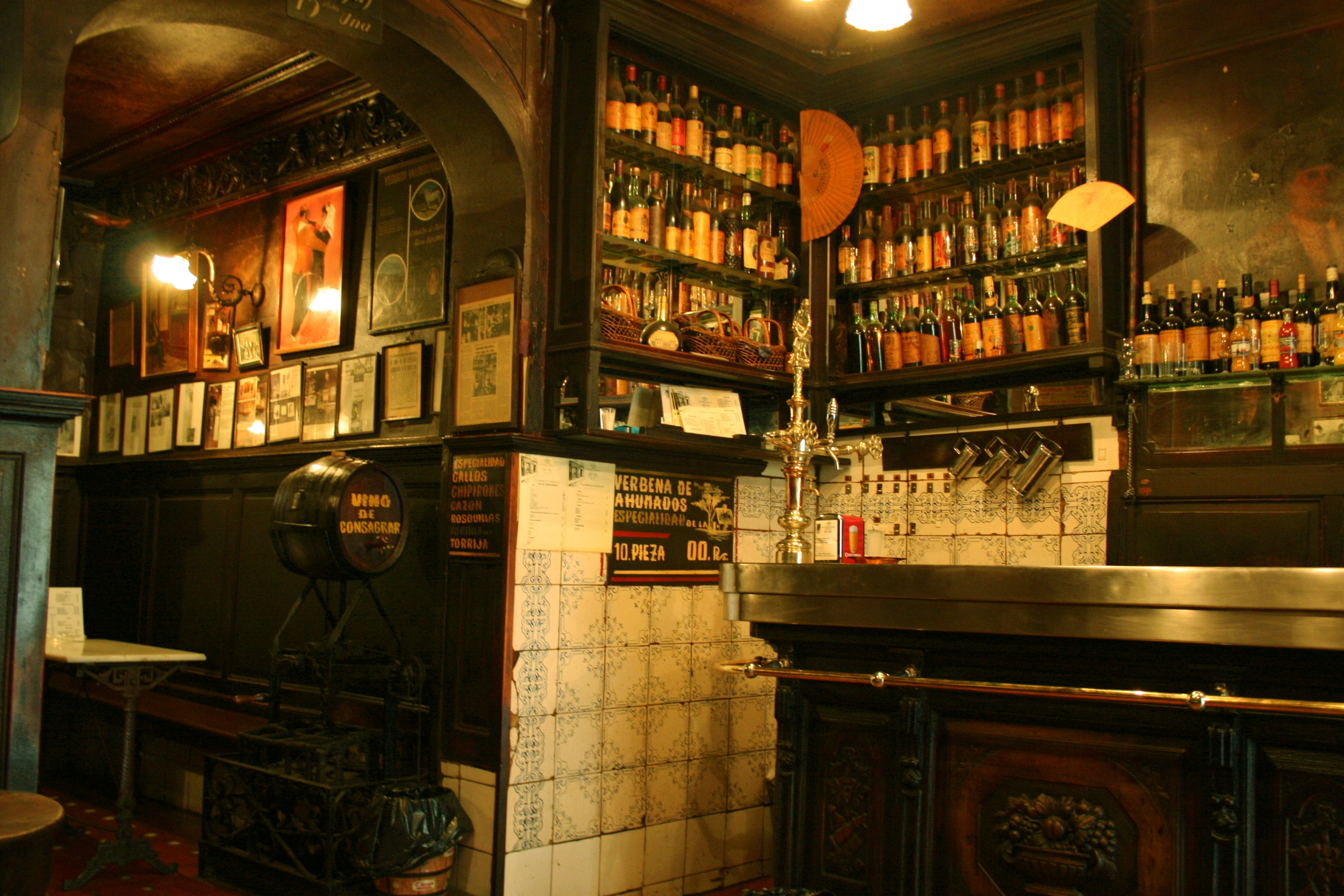 Taberna "Antonio Sánchez" - Calle de Mesón de Paredes - Madrid- Fundada en el año 1830 por el picador Colita, luego perteneció al diestro Cara Ancha, y desde entonces siempre ha estado regida por personas vinculadas al mundo del toro.